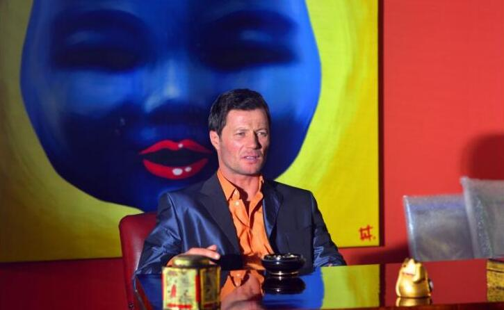 Stohl András a Senki szigete film vágóképén.